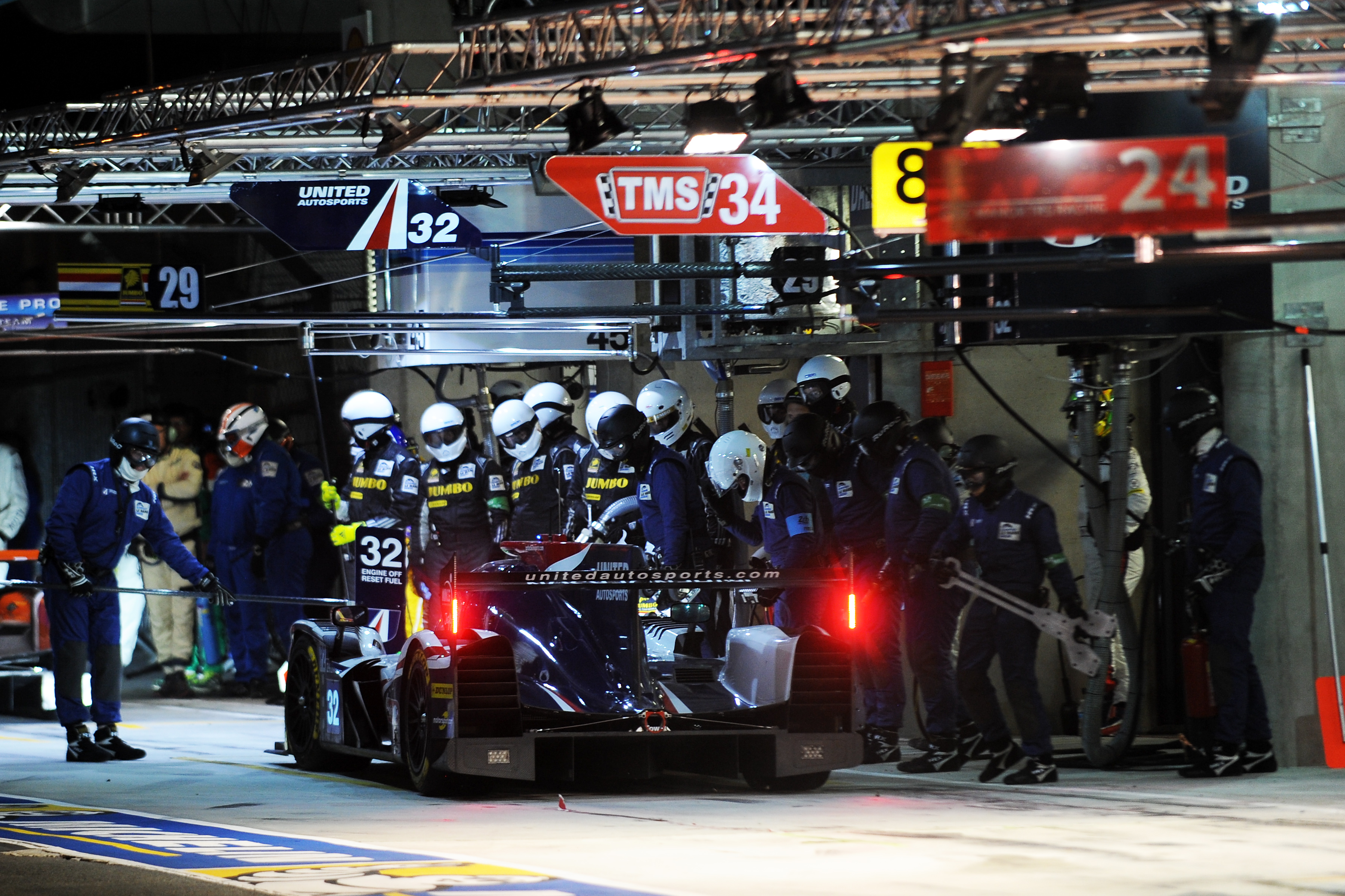 United Autosport lors des 24 Heures du Mans 2017.